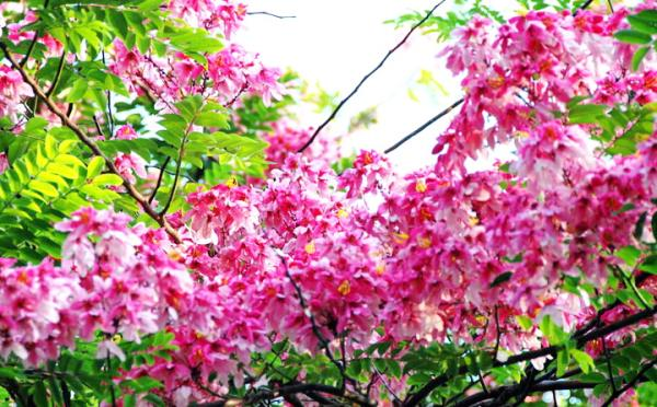 ต้นชัยพฤกษ์